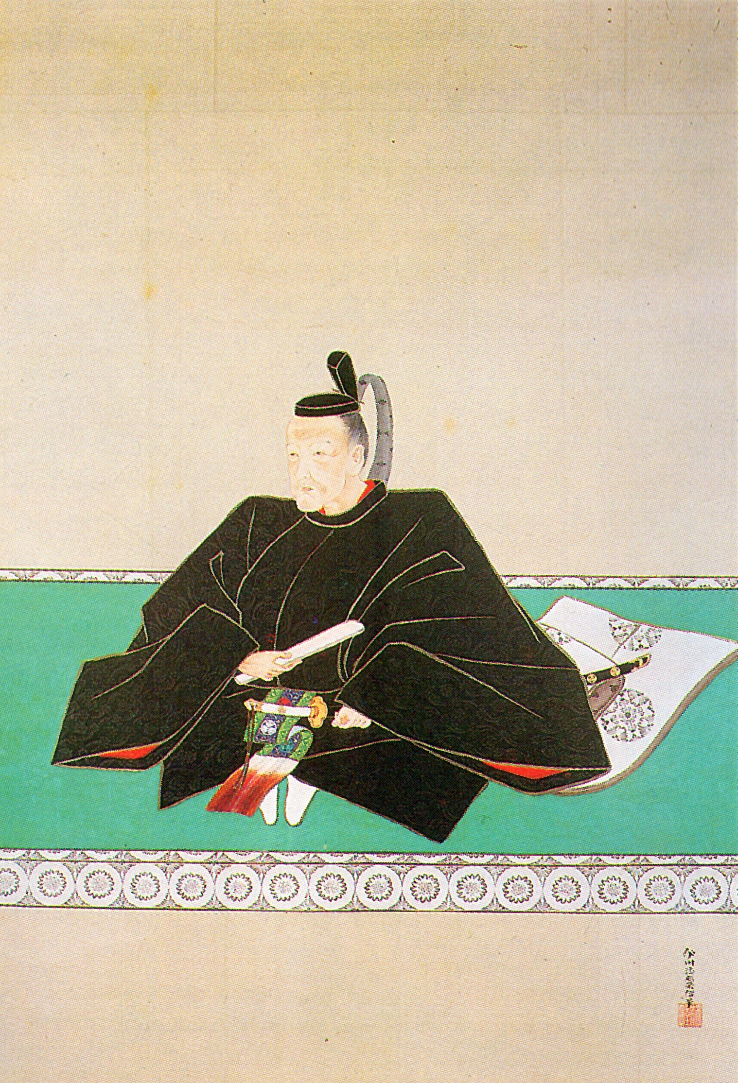 松平容頌の肖像。